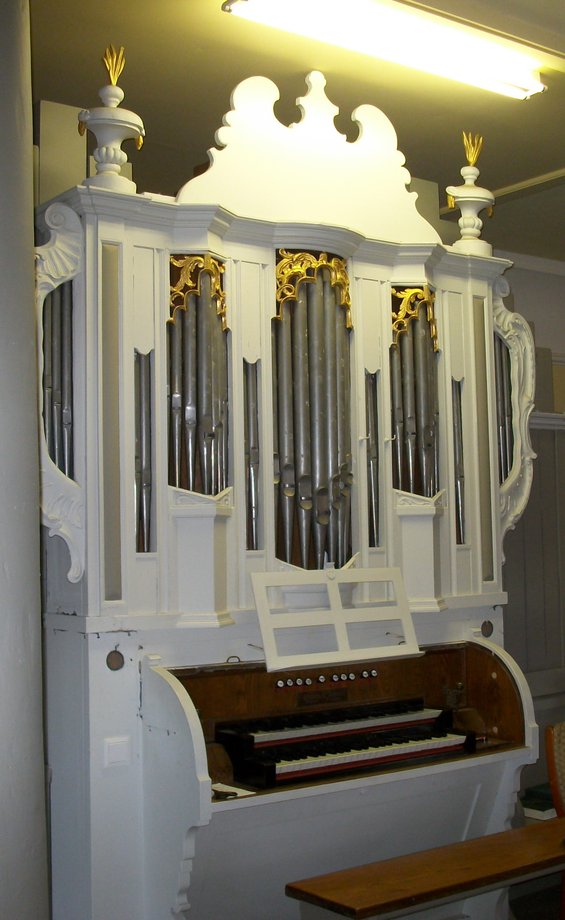 Schukeorgel nach Restaurierung, Aufnahme 2012, Denkmalschutz